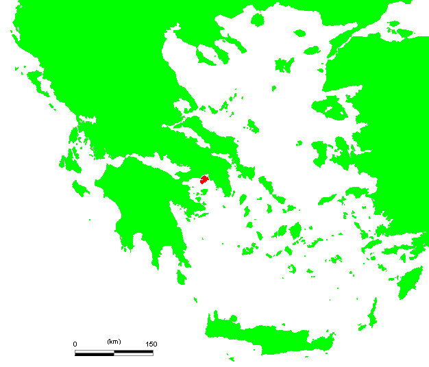 GR Salamina.PNG (Greek island)